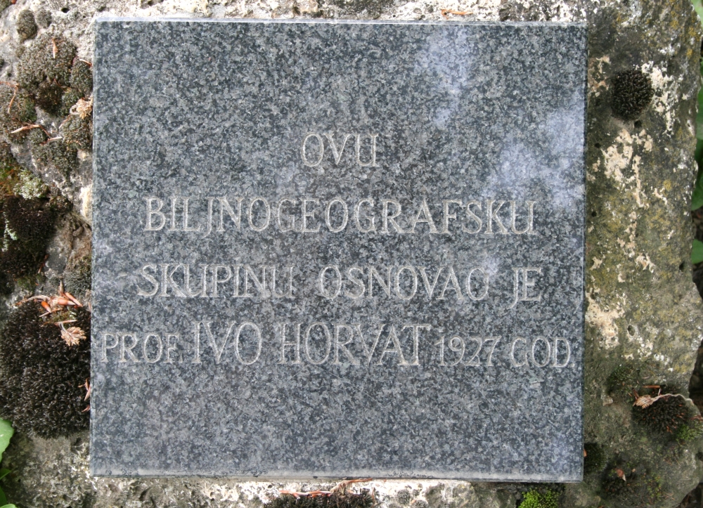 spomen ploča Ivi Horvatu, snimljeno u Botaničkom vrtu u Zagrebu.